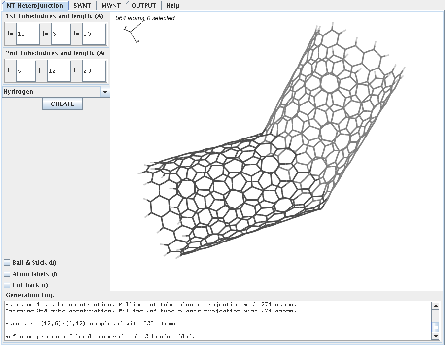 GMDM